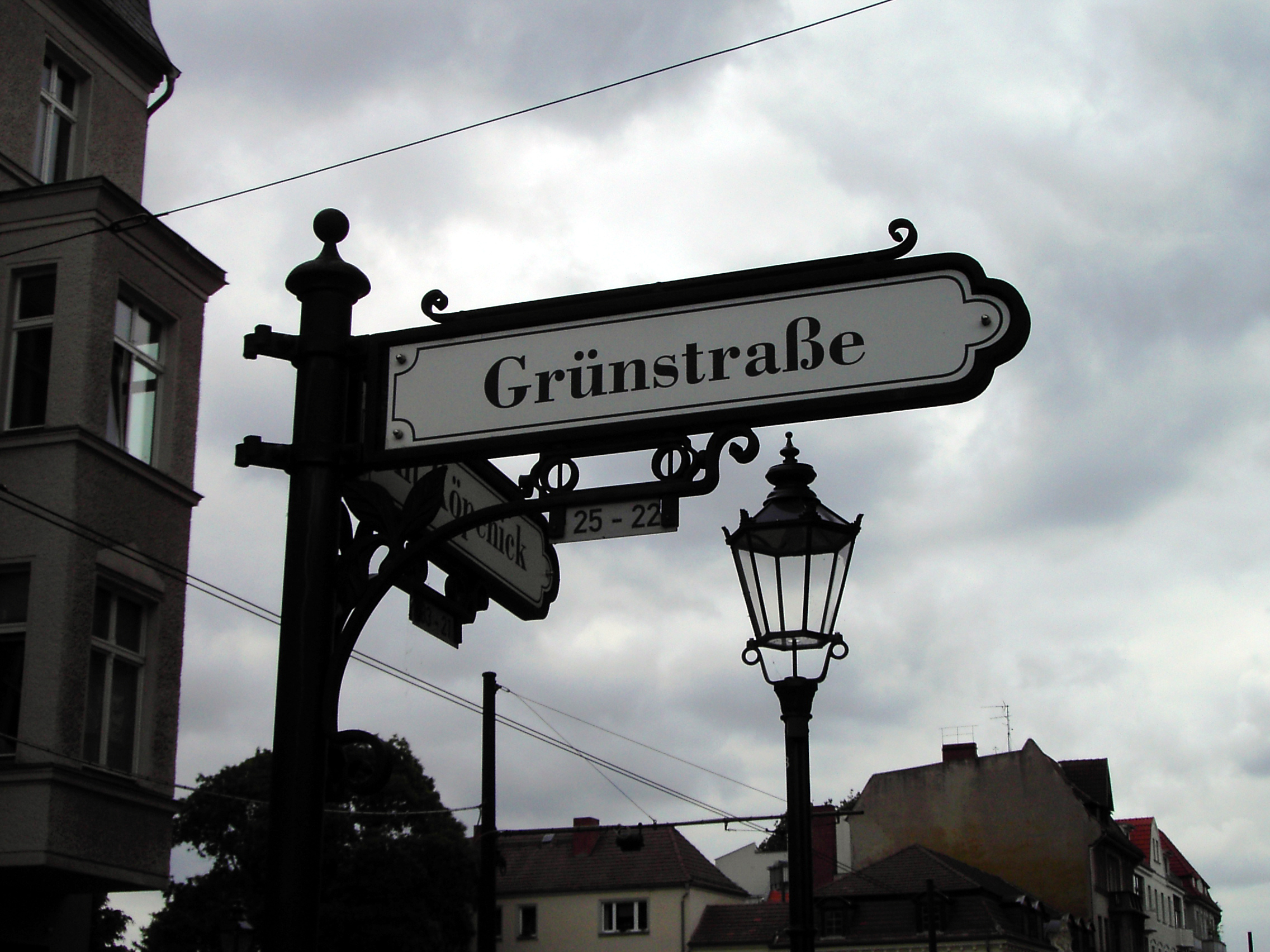 Berlin-Köpenick - historische Straßenschilder